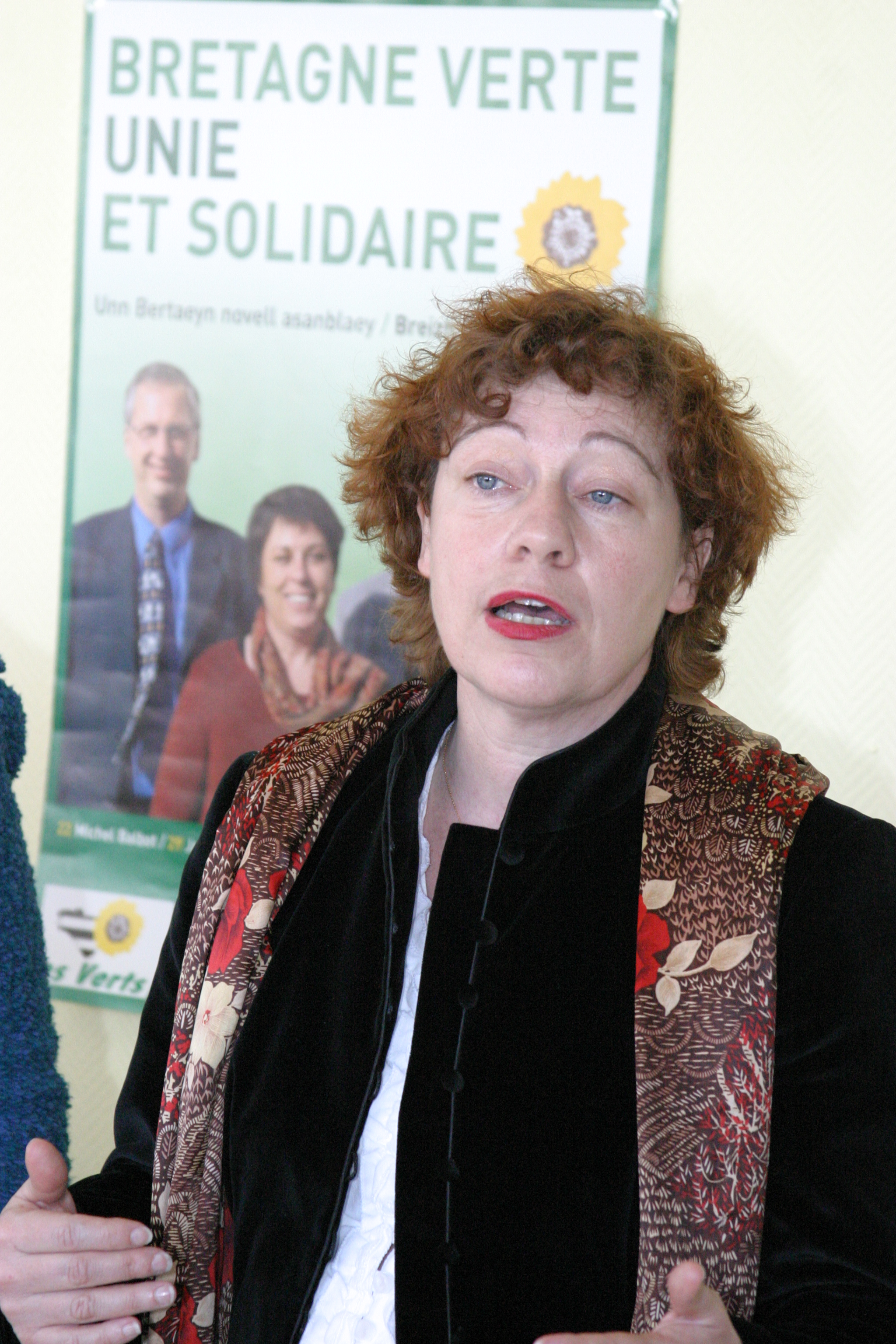 Marie Christine Blandin, régionales 2004, Brest